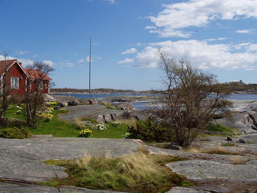 Björkskäret (Västerskär) i Björkviks skärgård. Fotograf: Fredrik